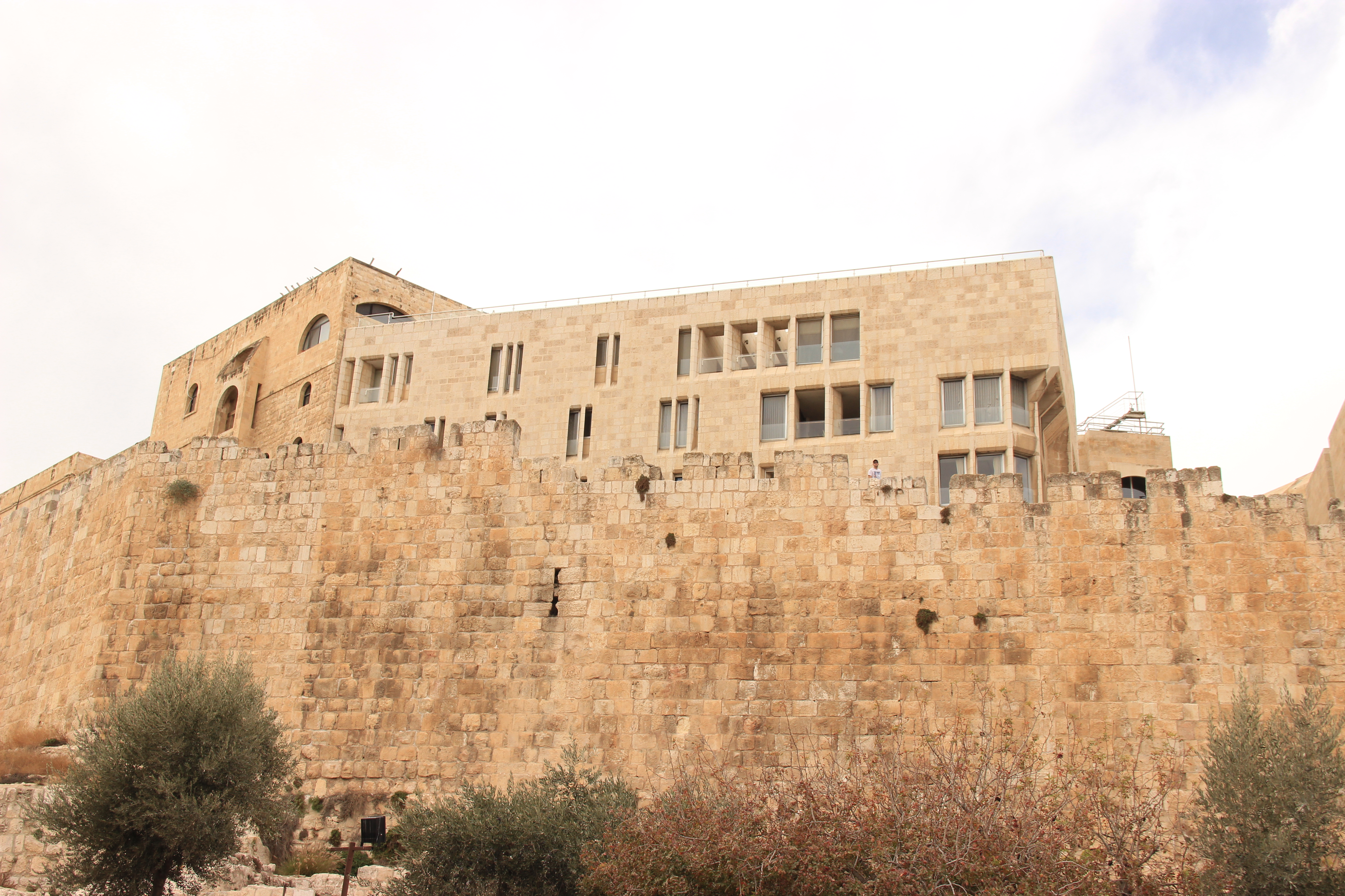 מוזיאון חצר היישוב הישן הוא מוזיאון אתנוגרפי ברובע היהודי בעיר העתיקה בירושלים המשקף את אורח החיים המסורתי של אנשי "היישוב הישן" במאתיים השנים שקדמו לנפילת הרובע היהודי במלחמת העצמאות.